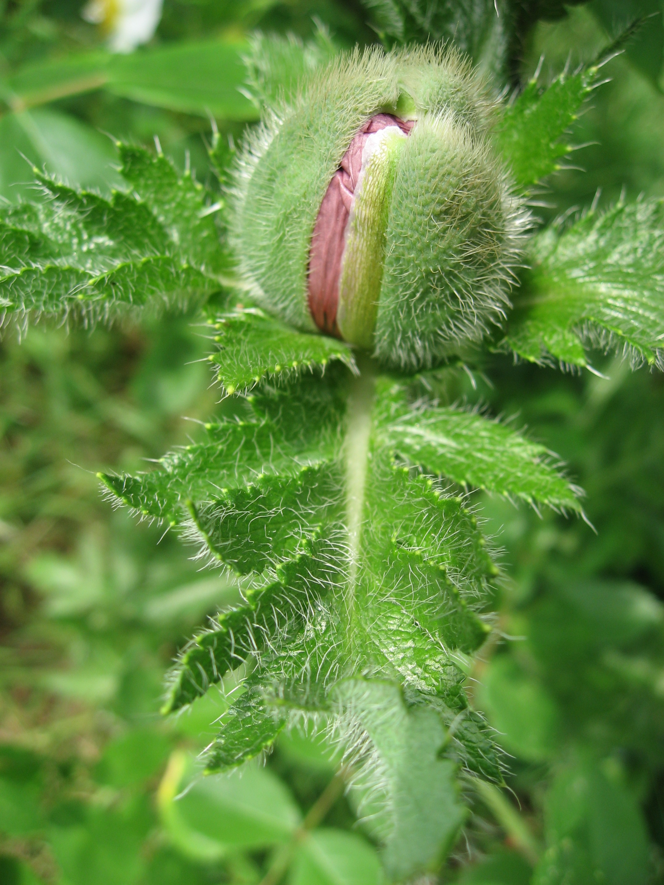 Papaver orientale in Jardin de l'ile verte Map: 48° 46' 27" N 2° 16' 14" E